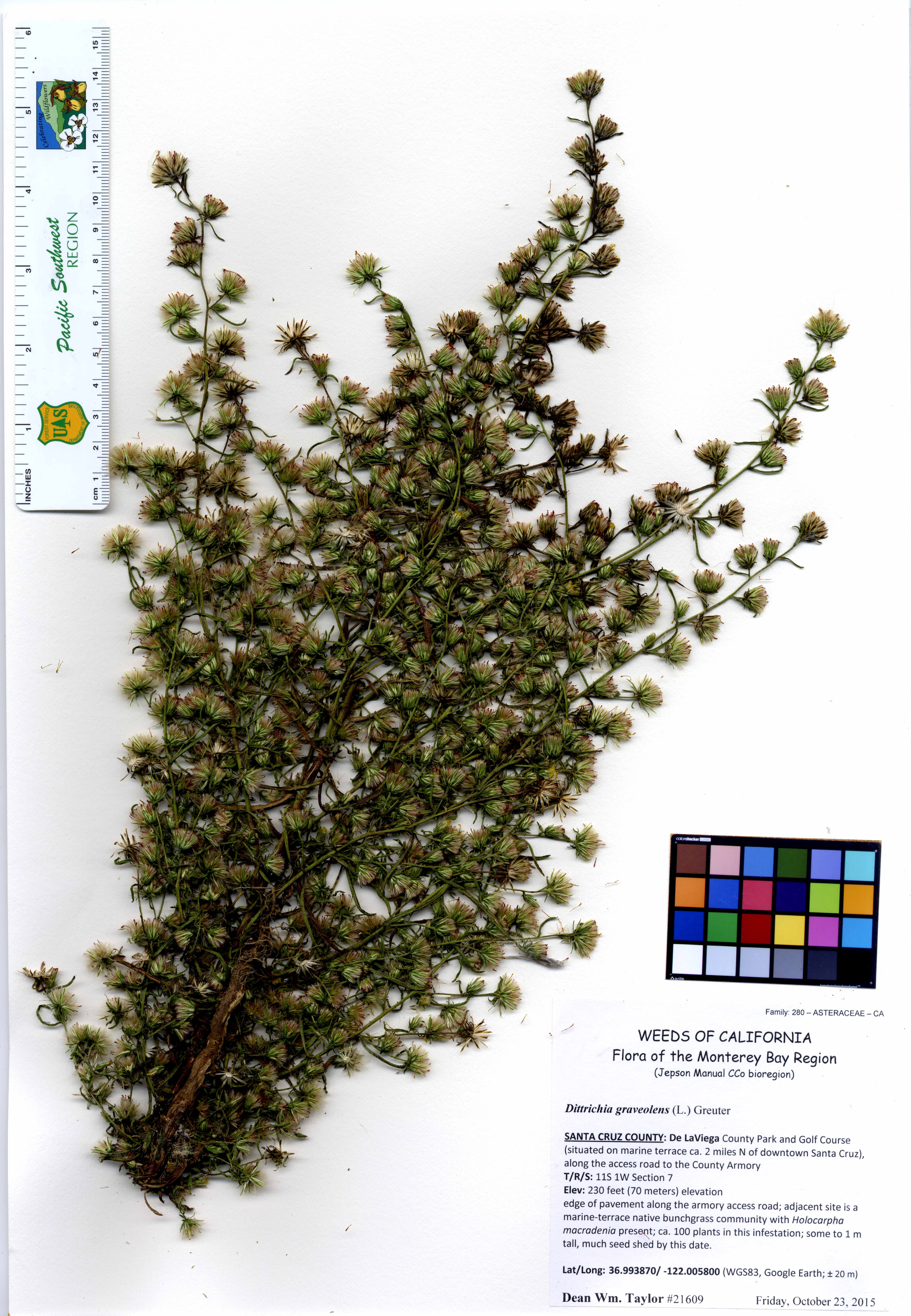 Asteraceae